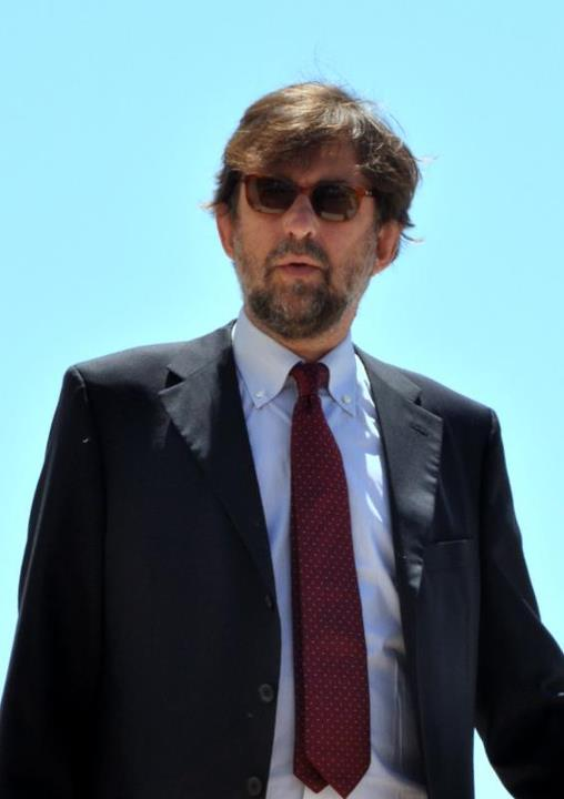 Nanni Moretti au festival de Cannes